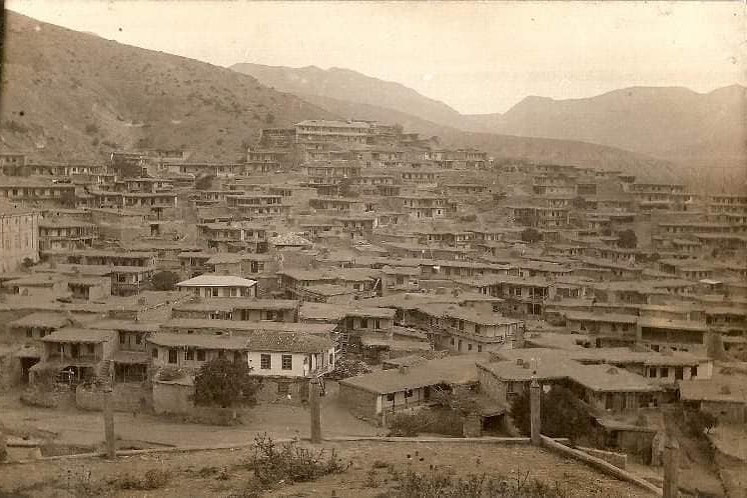 Крым (деревня Ускут) после депортации коренного народа -- крымских татар. Фотография 1945 года, то есть новыми жителями Крым еще не успели заселить. Исаак Дунаевский писал: ⠀ «Я считаю, что Крым без татар потерял свою экзотику, которая создавала ему неповторимую красоту и аромат подлинного Востока. От Крыма остались только "бывшие места", лишенные тех людей, которые создавали содержание этих мест, язык, обычаи, нравы, костюмы и быт. Когда рядом с саклей в Кореизе Вы видели чумазого татарчонка или вечно ленивого, сидящего в барашковой шапке на самом солнечном пекле татарина, слышали их речь и видели развешанные вдоль стен листья табака – это был Крым. Когда рядом с Бахчисарайским дворцом вы видели стройную, молодую татарку, несущую на плече корзину с персиками или мушмулой – это был Крым. А теперь остались лишь одни названия, и то не знаю почему».